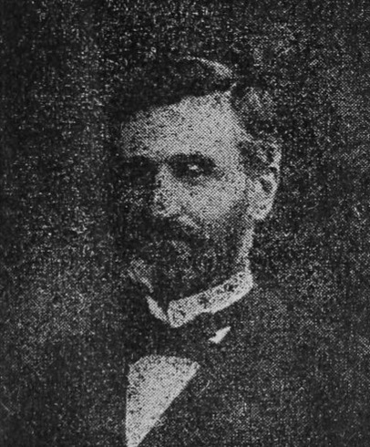 "Mathé (Félix)".